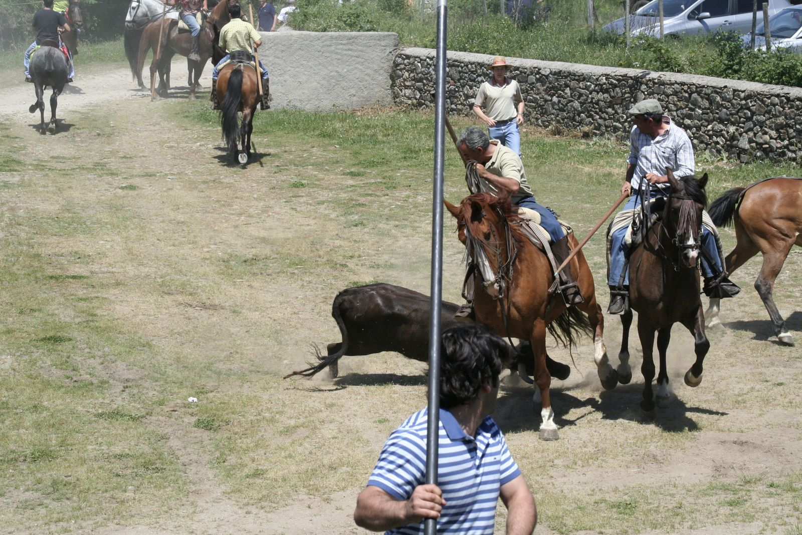 Encierro llegando a la entrada de la plaza